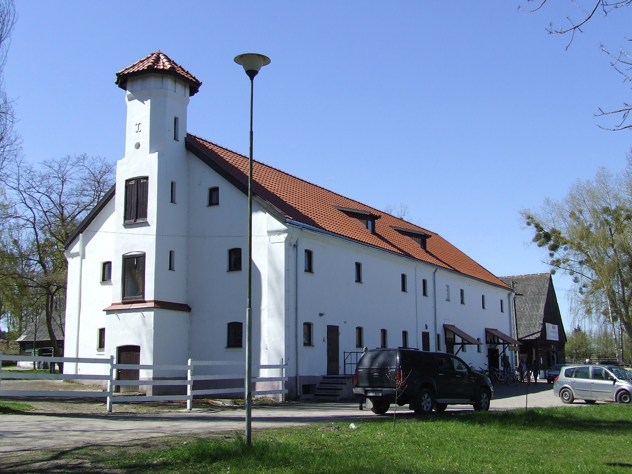 Popielno - stary spichlerz (powiat piski)